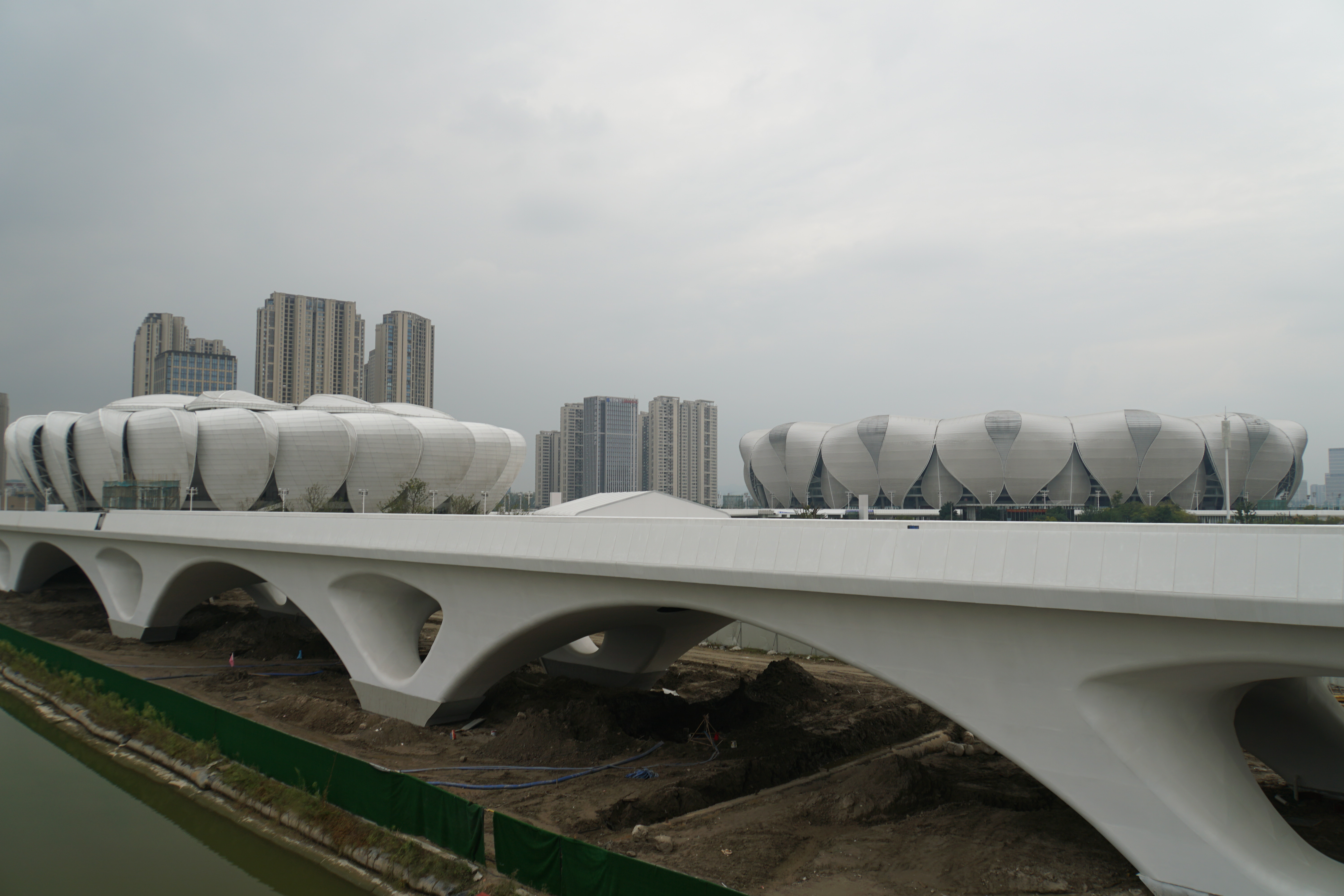 杭州奥体中心体育场和网球中心，2018年10月